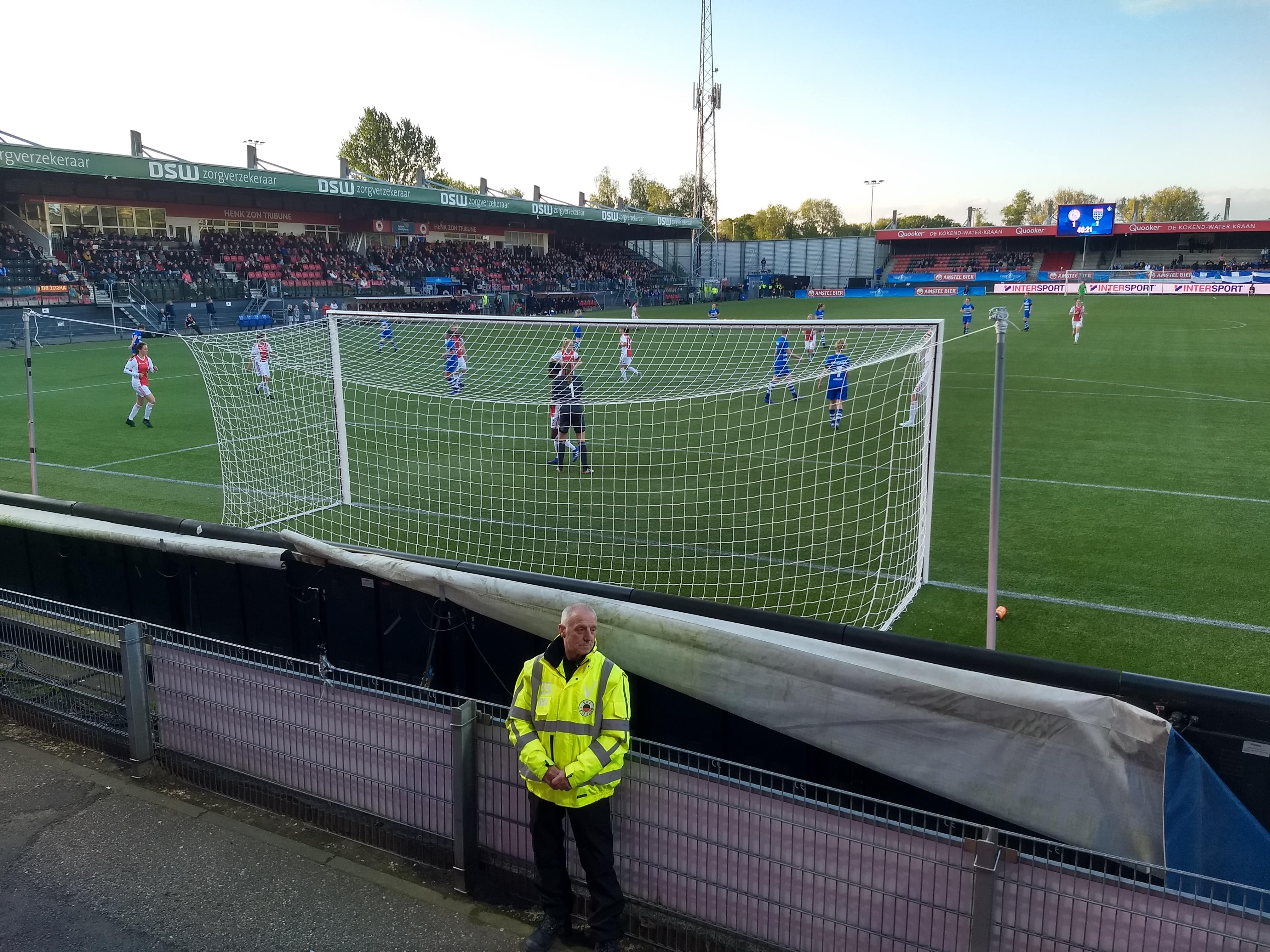 KNVB finale vrouwen 2018–19